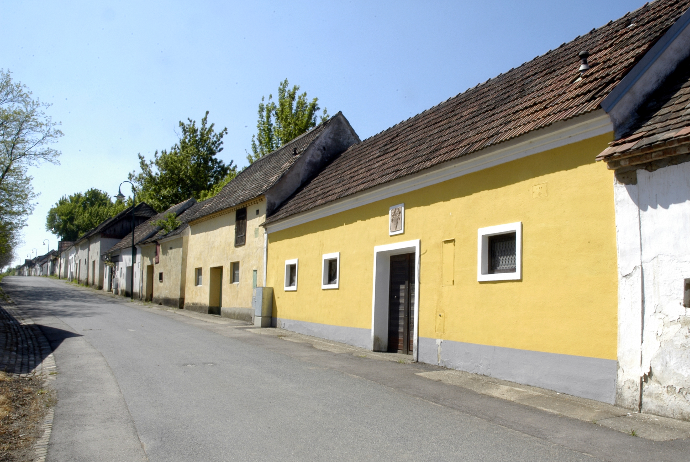 Kellergasse in Kleinhöflein, Gemeinde Retz